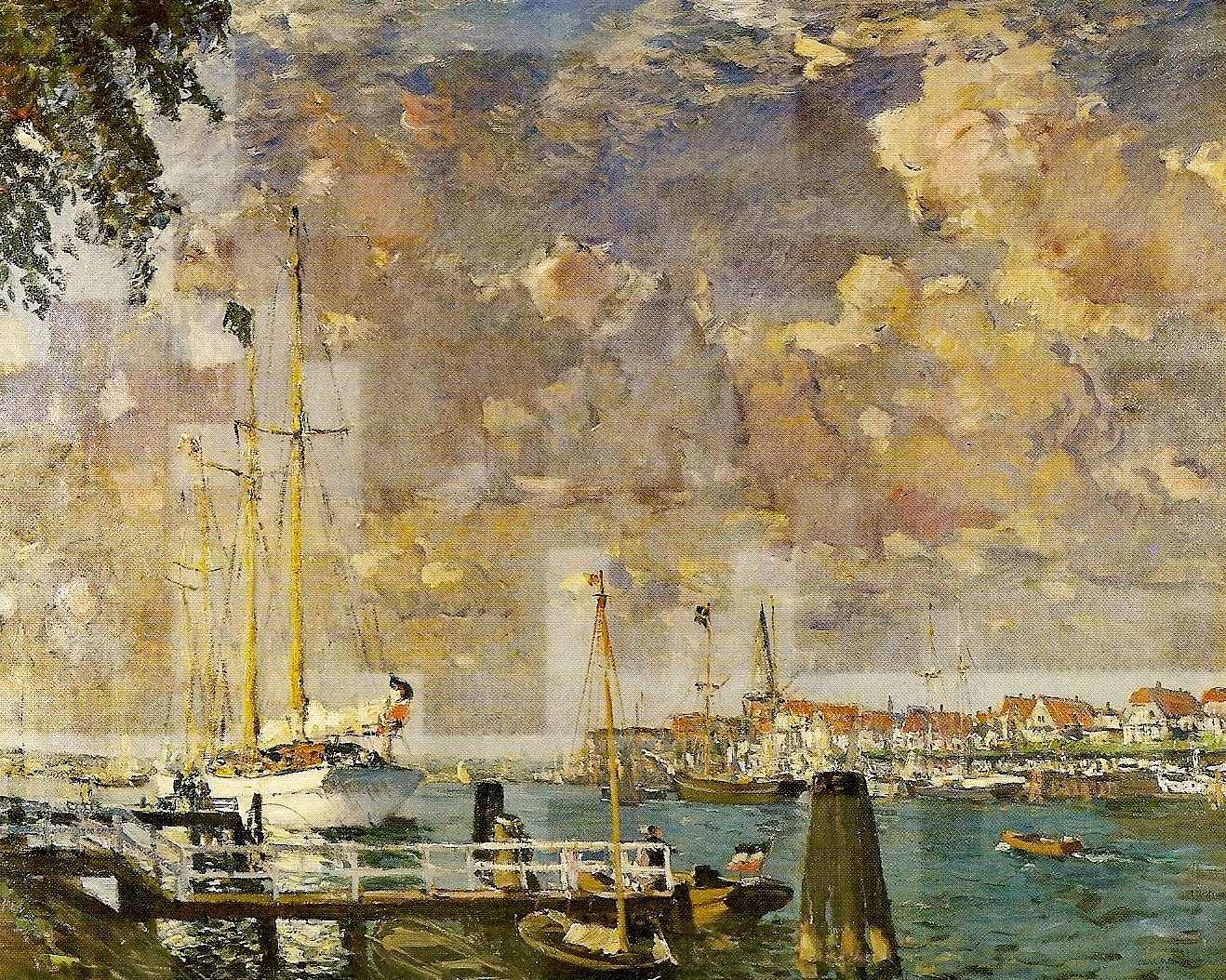 Die Kaiseryacht Meteor IV liegt am Ufer des Priwalls in Travemünde. Blick über die Trave auf das alte Travemünde.